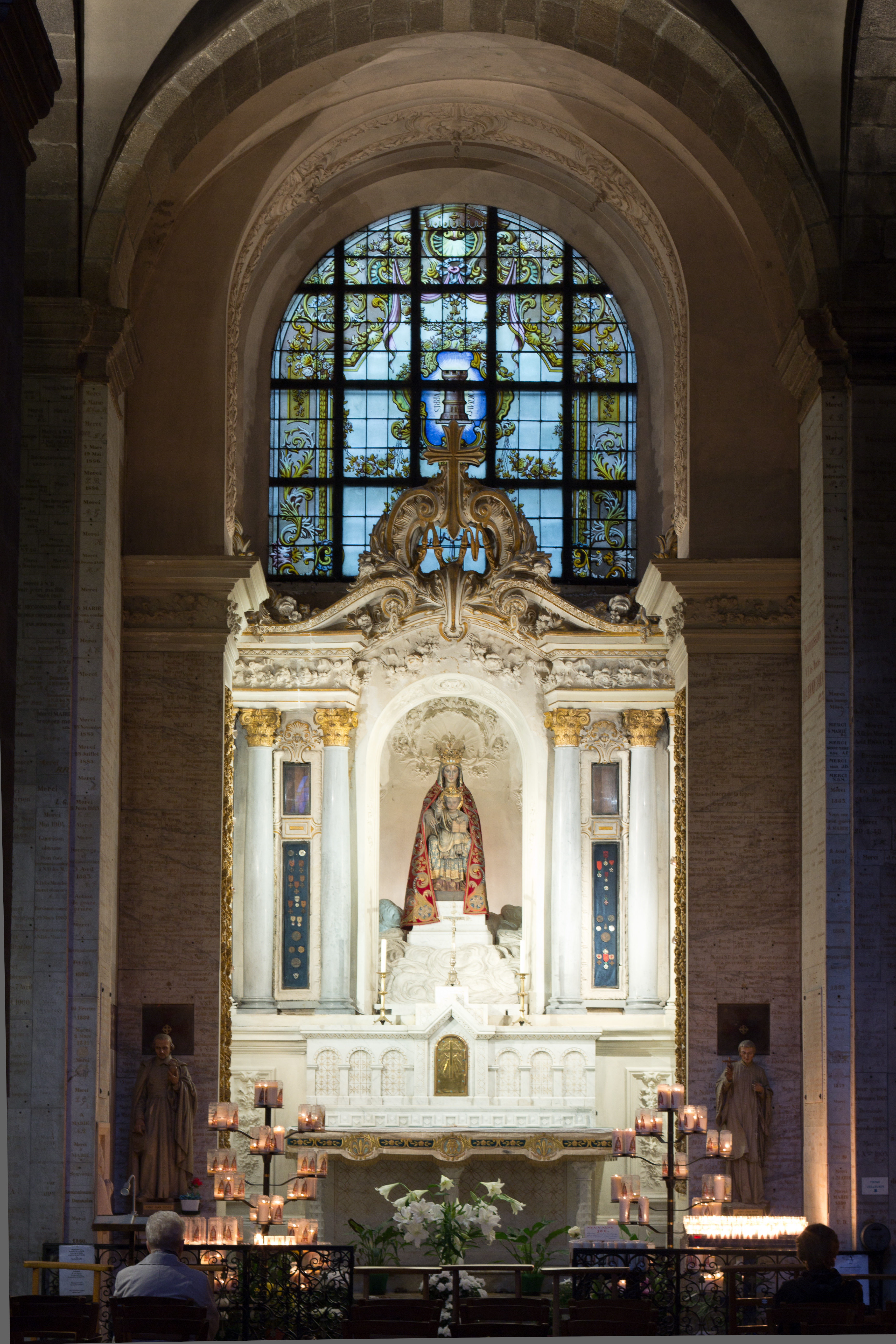 Chapelle Notre-Dame des Miracles et des Vertus de la basilique saint Sauveur de Rennes. Autel néo-roman en marbre de Folliot (1875) et retable rococo de Couasnon (1912). Statue néo-romane de la Vierge par Charles Goupil et Jobbé-Duval (1876).